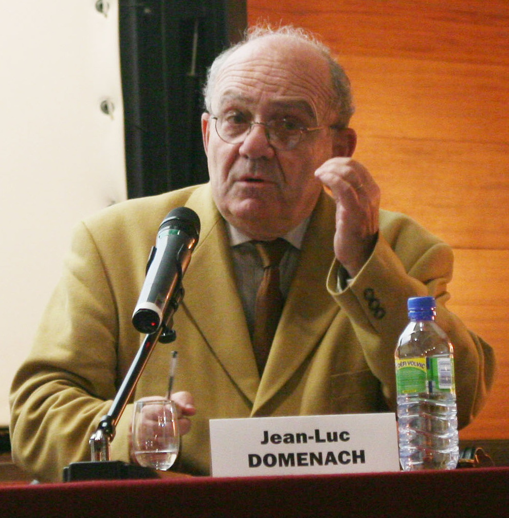 Jean-Luc Domenach, le 4 novembre 2009, lors du colloque international "Sortir du communisme, changer d'époque", organisé par Fondapol en partenariat avec la Fondation Robert-Schuman.